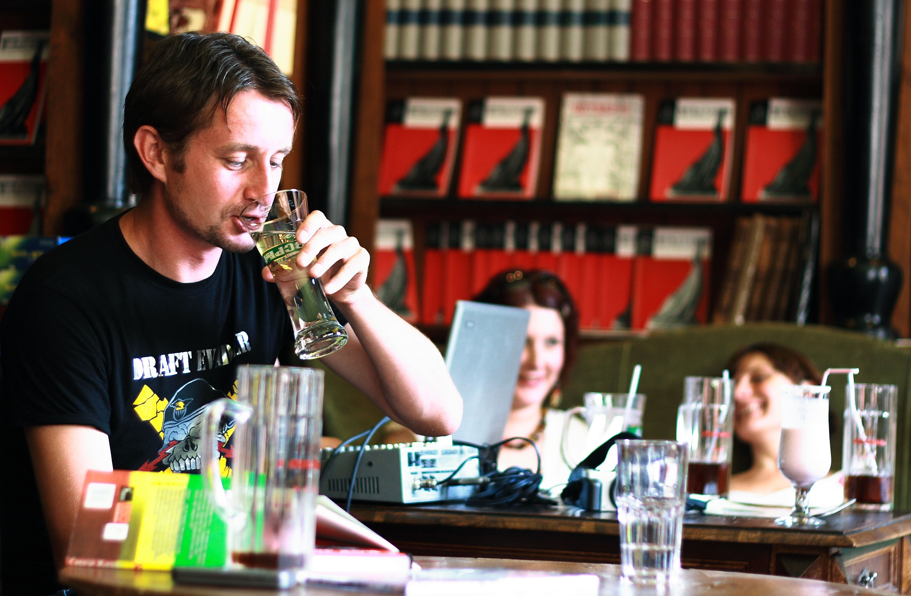 Сергей Жадан, украиноязычный поэт и прозаик